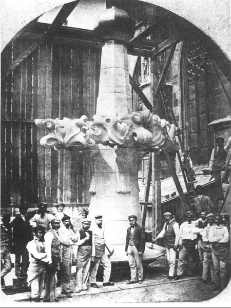 Turmspitze des Südturms des Stephansdoms, Wien. Um 1863/64.